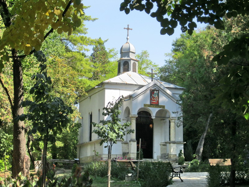 Параклисът в Градската градина на Попово - лято 2012 г.